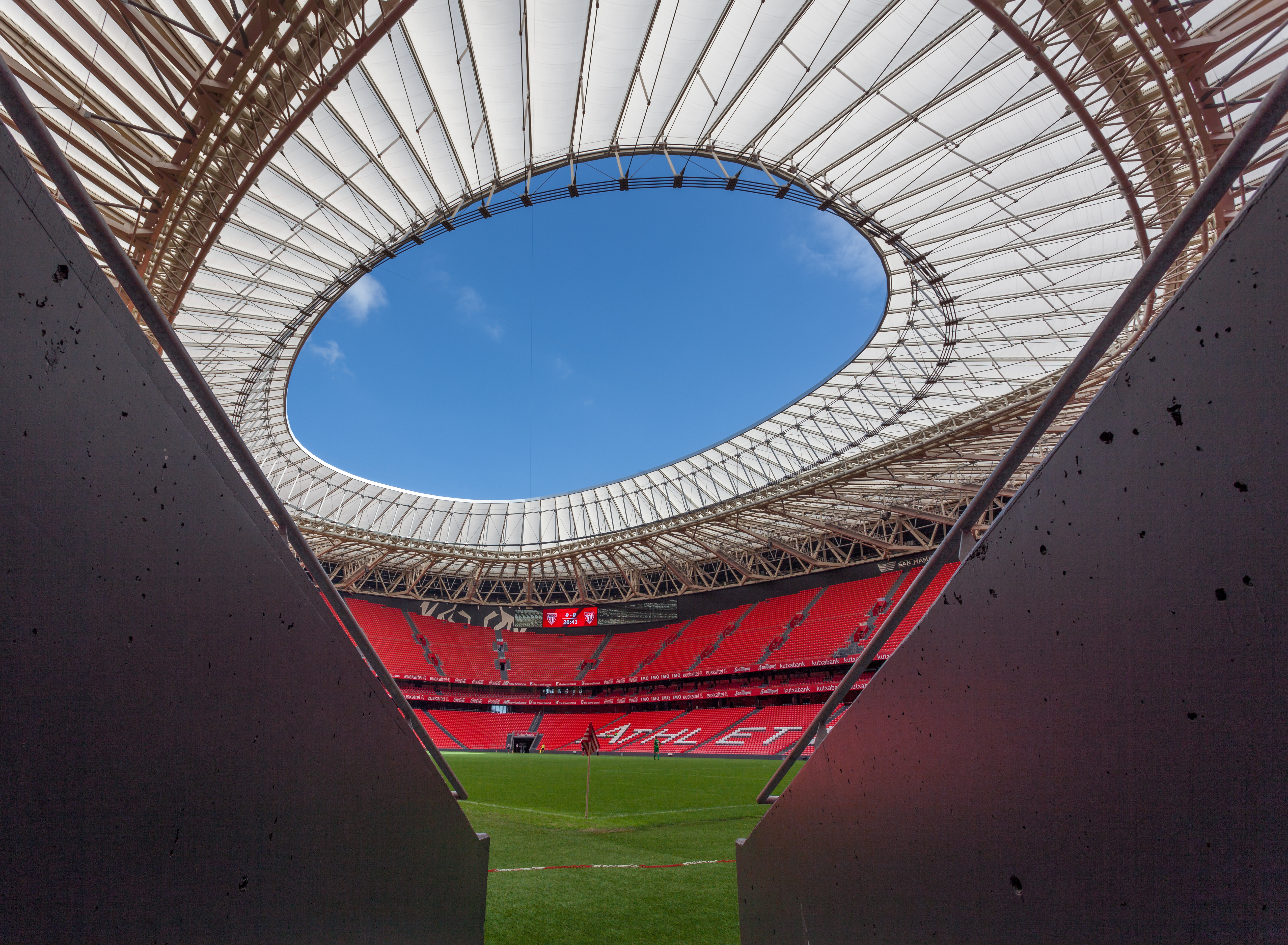 Blick auf das Feld im San Mamés Stadion